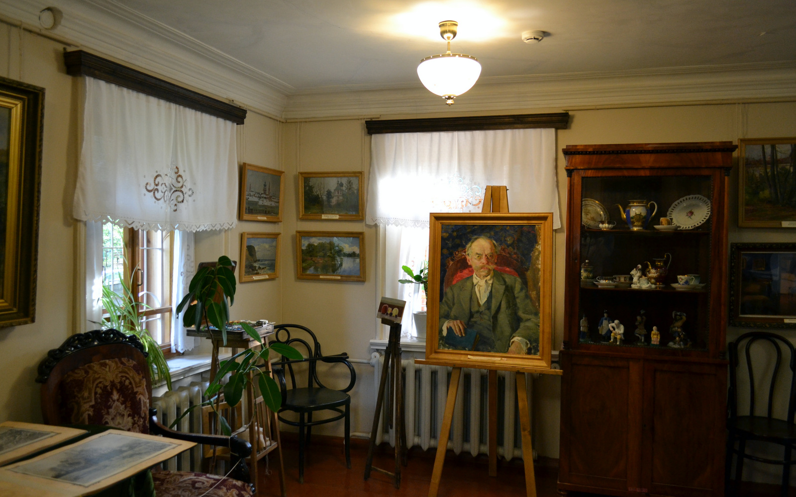 Дом художника Н. Н. Хохрякова: Копанский пер., 4, Киров, Кировская область